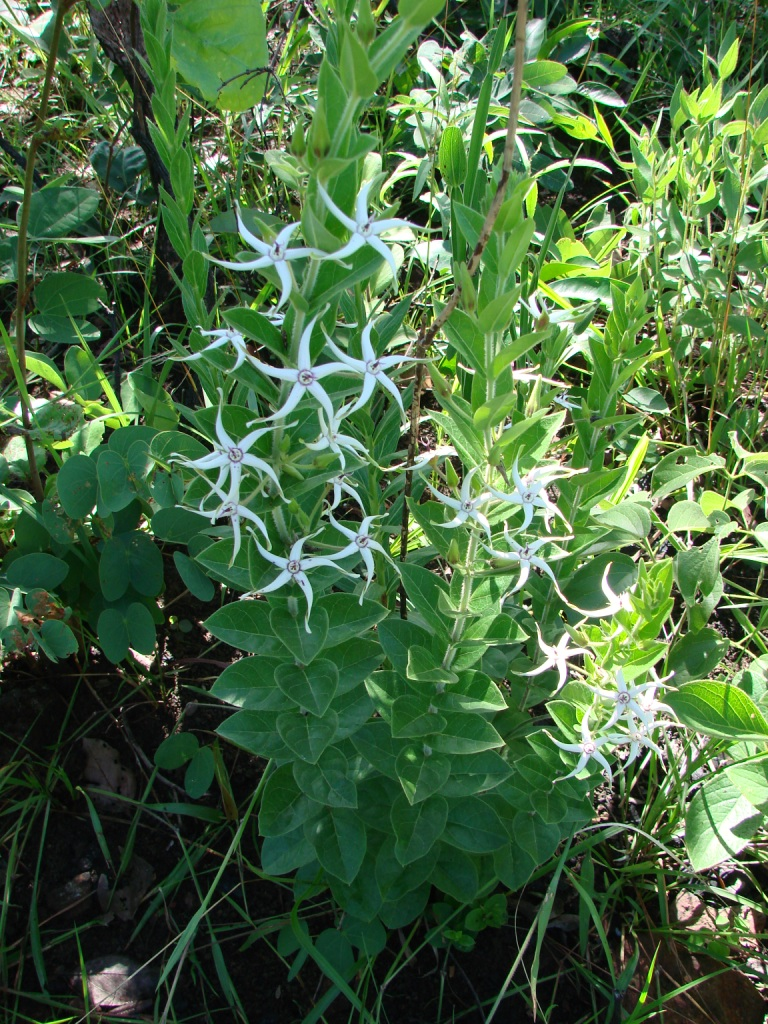 Oxypetalum erectum - APOCYNACEAE - Parque Nacional da Chapada dos Veadeiros - Alto Paraíso de Goiás - Goiás - Brasil.